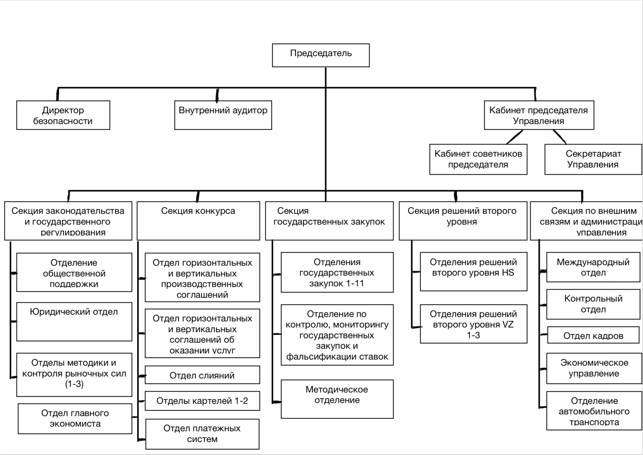 На картинке представлена структура управления по защите конкуренции чешской республики